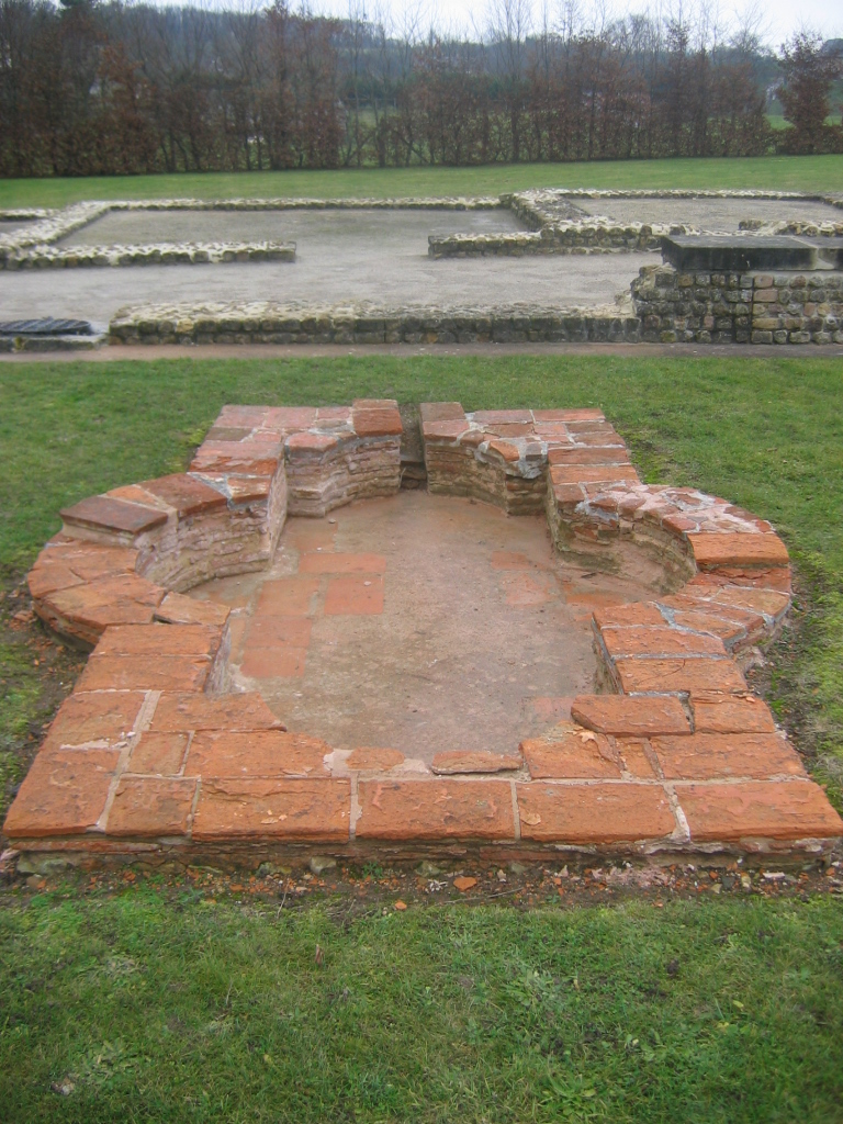 Impluvium de la villa gallo-romaine de Vieux-la-Romaine, près de Caen, Basse-Normandie, France. I took this picture on January 2006.